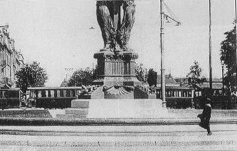 à Reims, vue du CBR_et_de la fontaine Bartholdi_place_de_la_République.